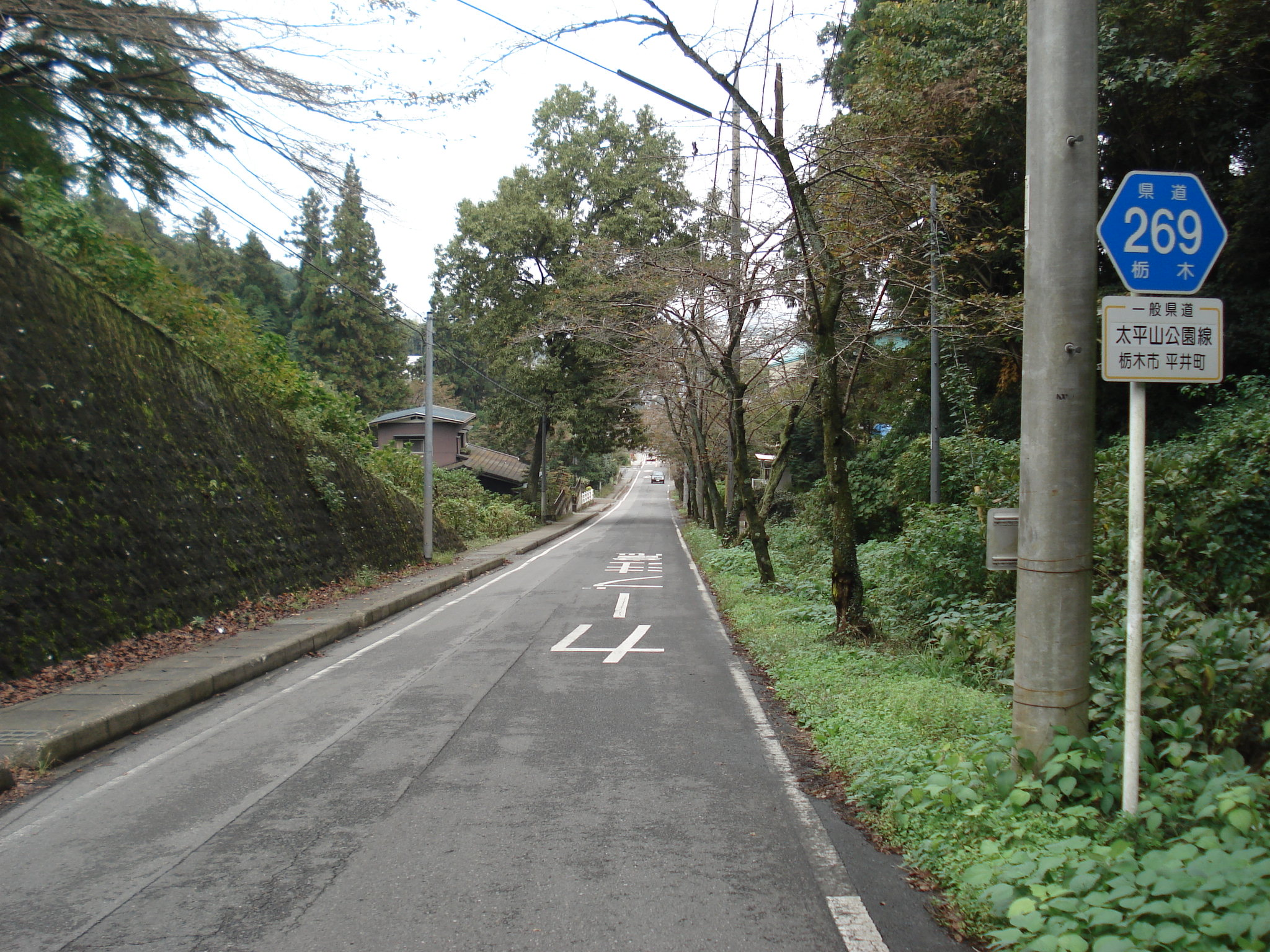 栃木県道269号太平山公園線 栃木県栃木市平井町（起点付近）